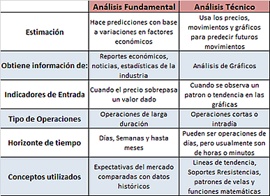 tabla de diferencia